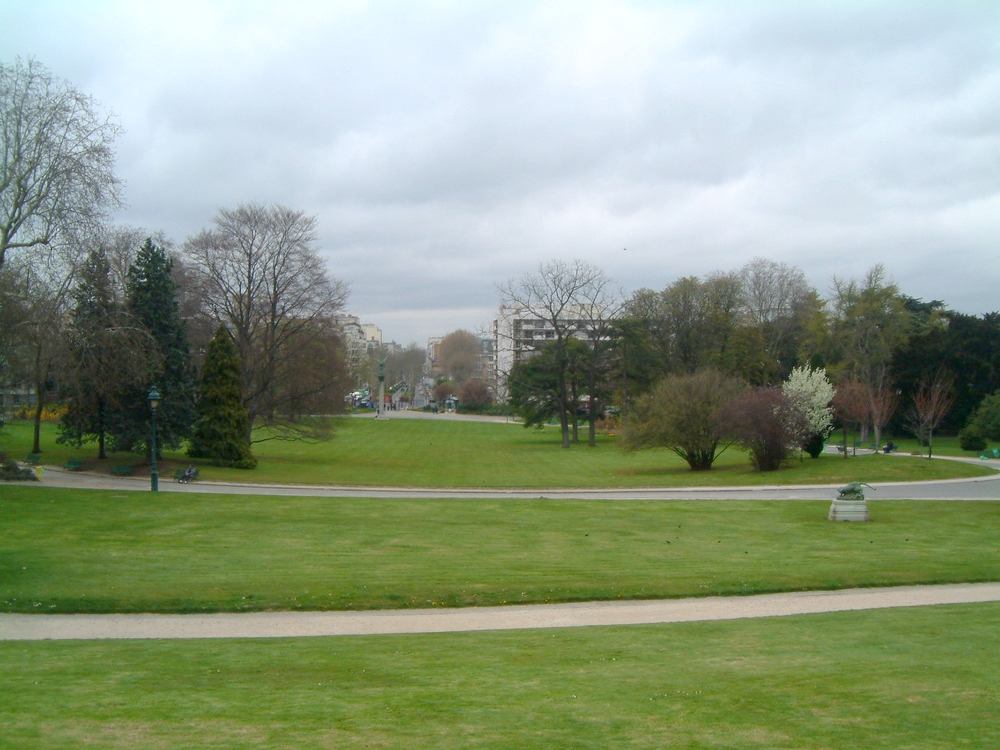 Pelouse du parc Montsouris à Paris.